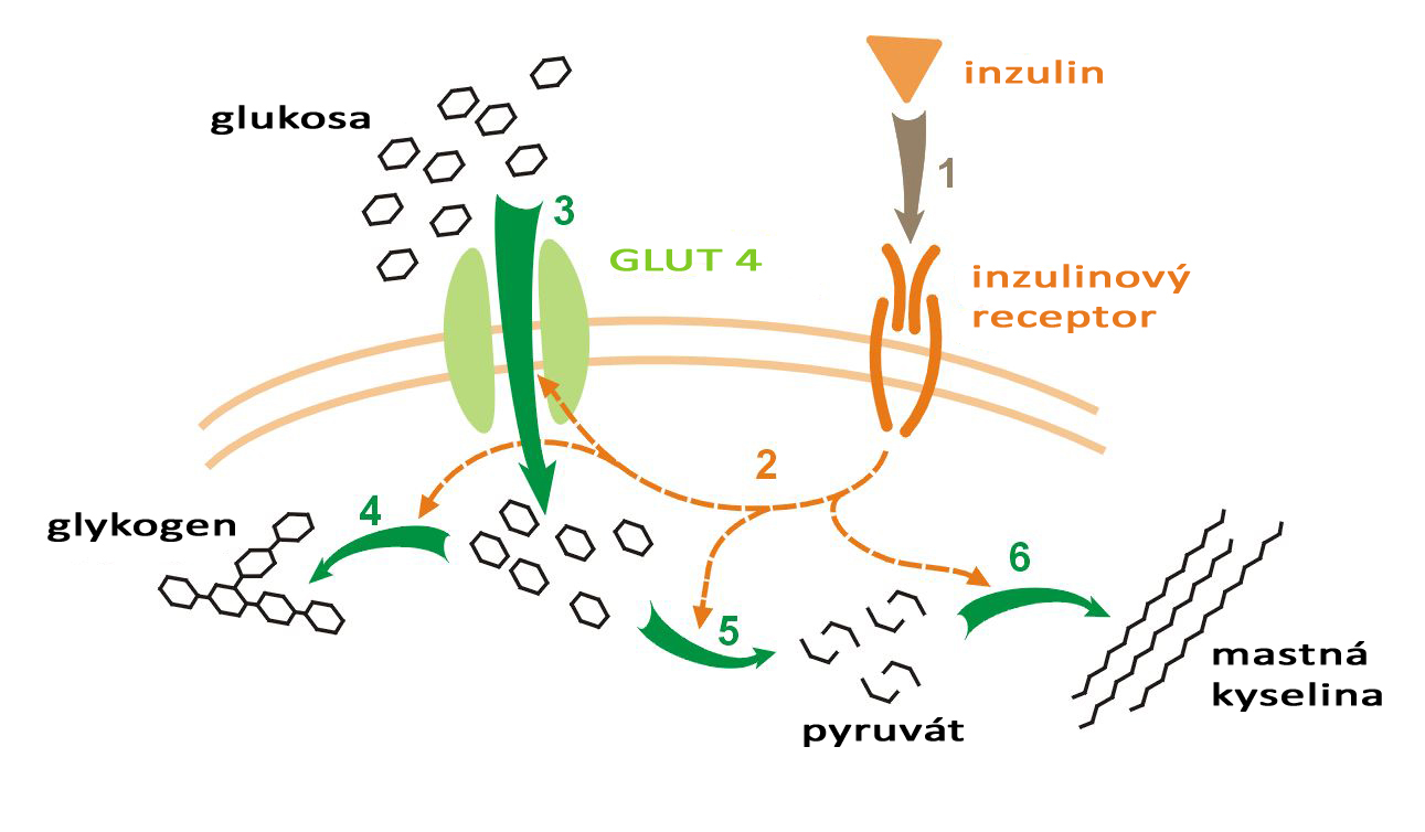 Metabolismus inzulin-glukosa - působení inzulinu na inzulinové receptory